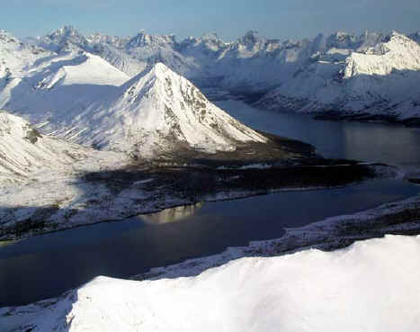 Twin Lakes, Alaska in winter.